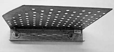 Schlichter Siebboden für industrielle Rektifikationsanlagen, vergleichbar mit einem Siebboden aus der Wirbelschichttechnik (Glatt)